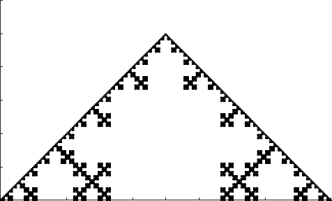 Variante de la curva de Koch. Fractal construido mediante un sistema de funciones iteradas. La dimensión de Hausdorff es de ln(5)/ln(3).